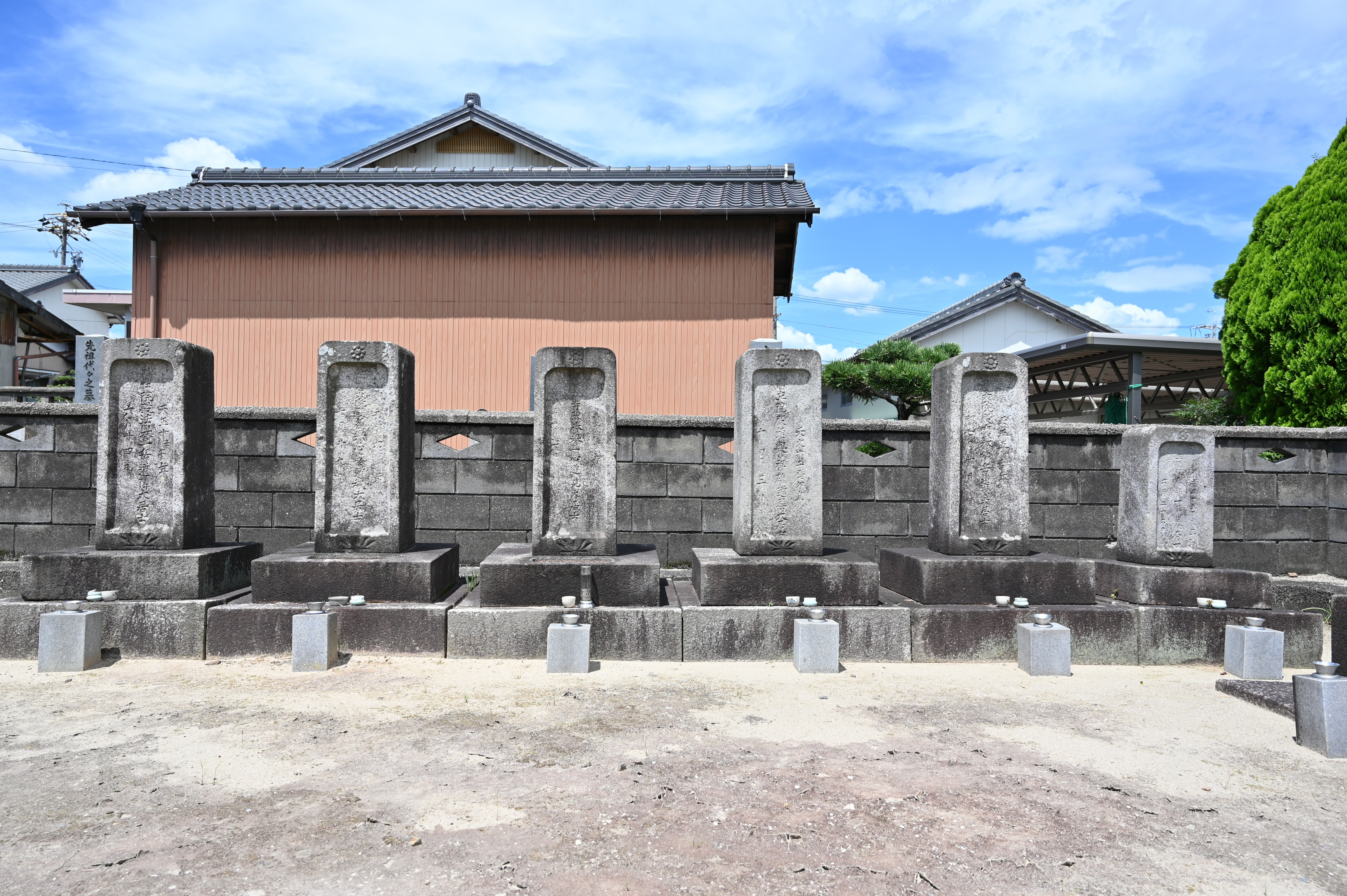 桜井山菩提寺にある桜井松平家の墓所